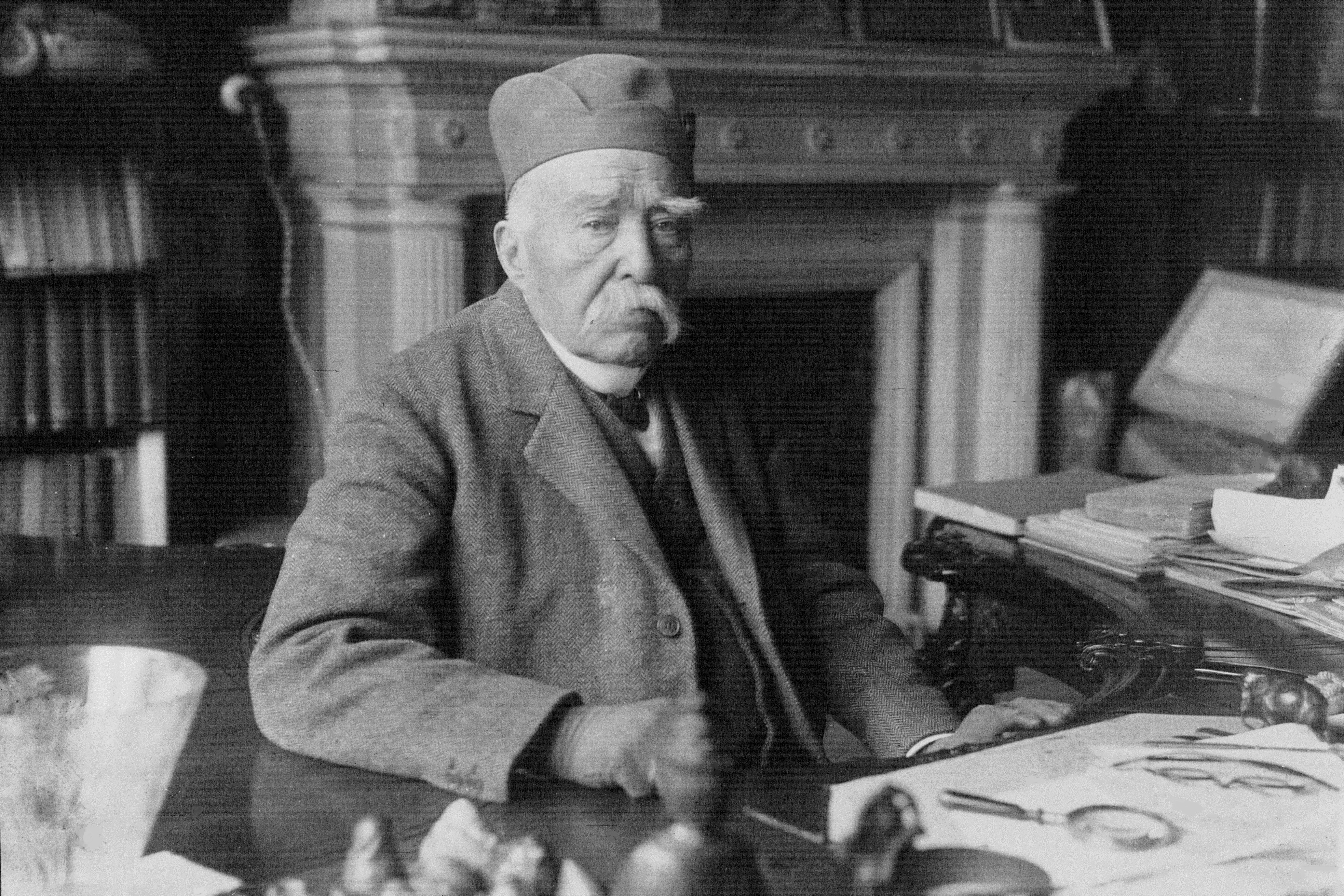 Georges Clemenceau chez lui, photographie agence Meurisse, 1928.